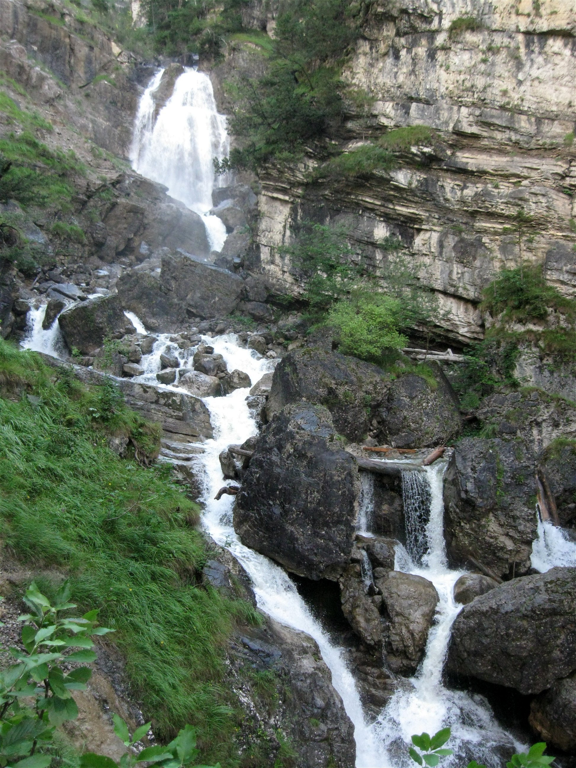 Kuhfluchtwasserfälle, Farchant